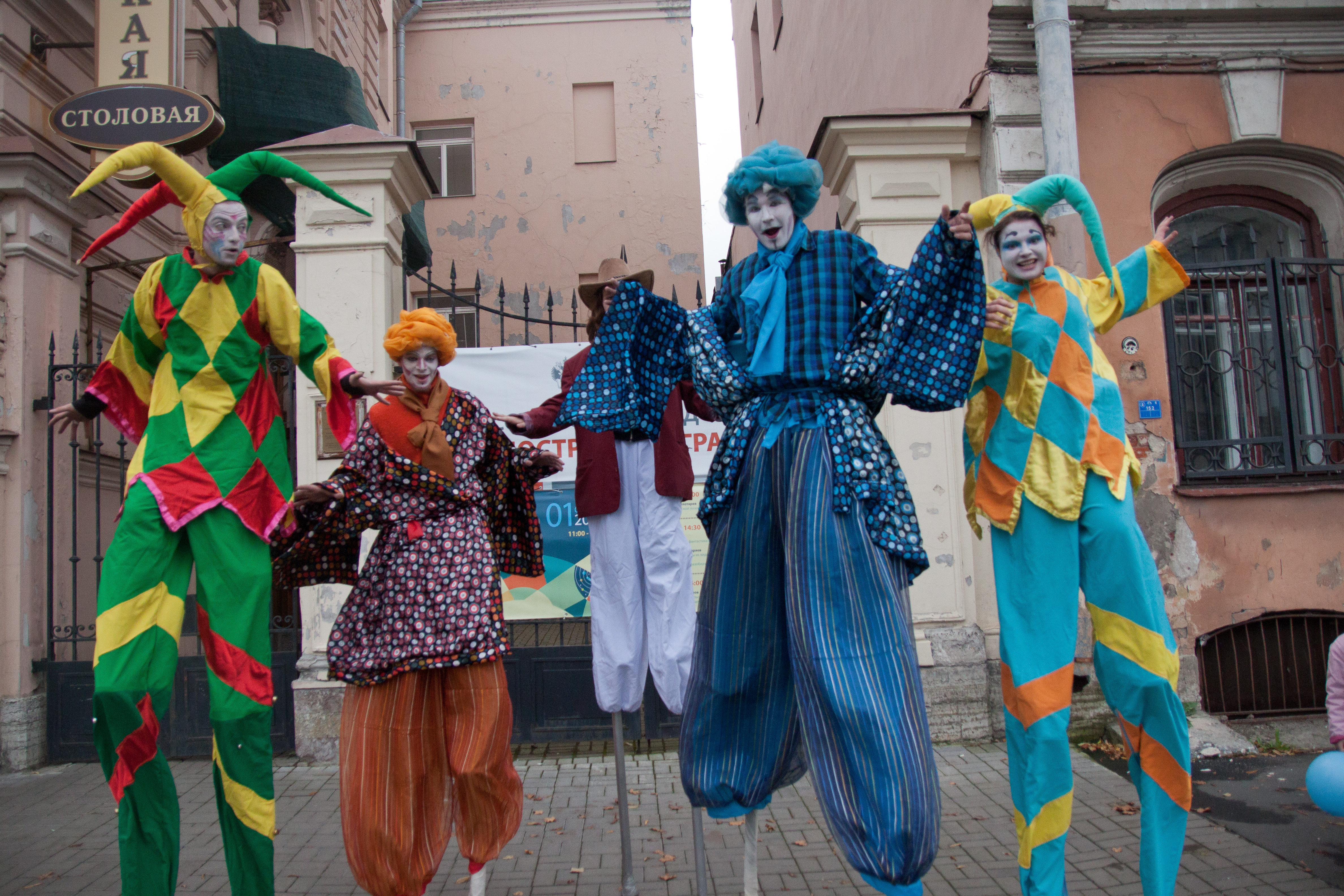 X Викиконференция на русском языке в Санкт-Петербурге